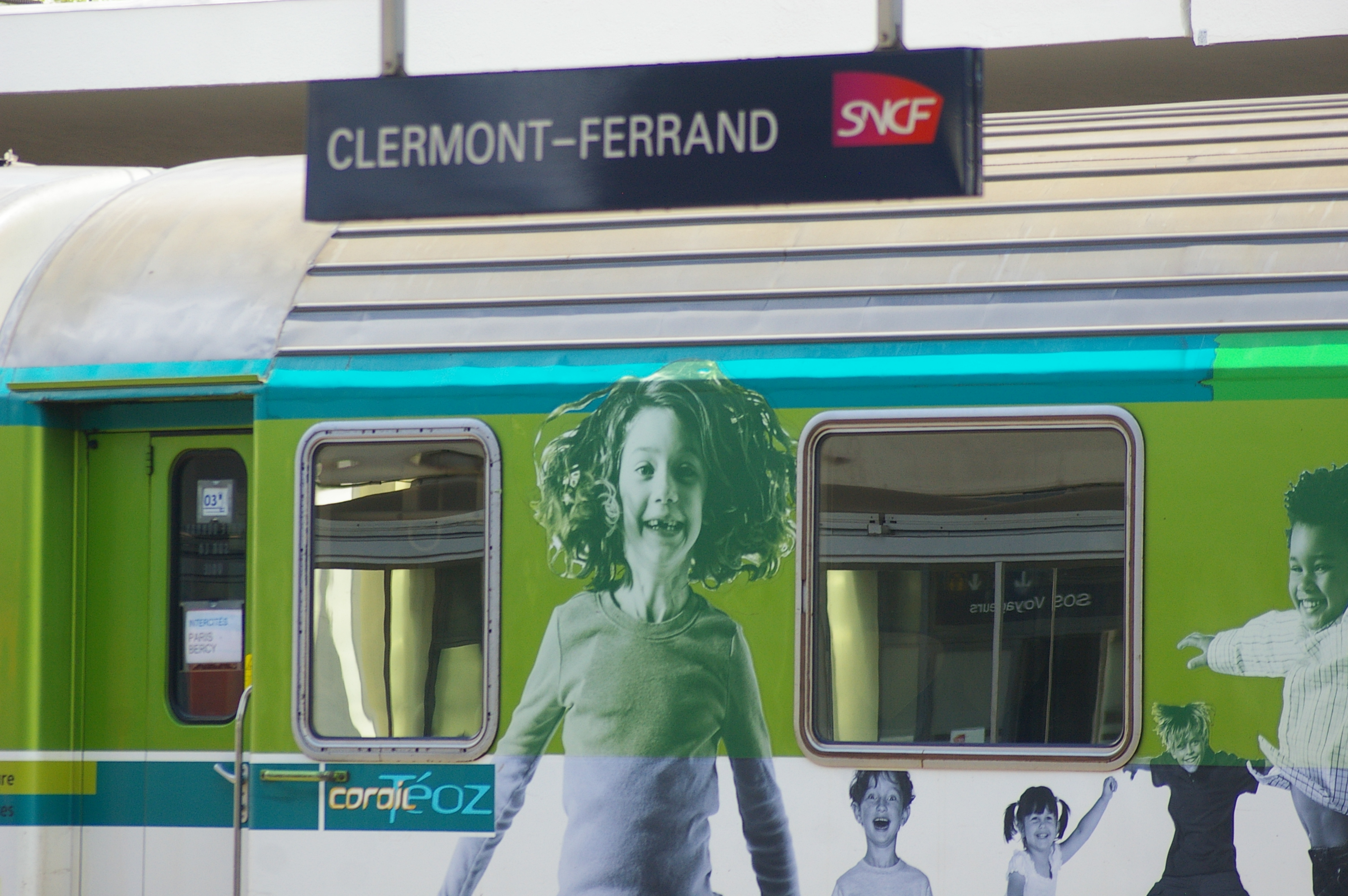 Corail Teoz en gare de Clermont-Ferrand